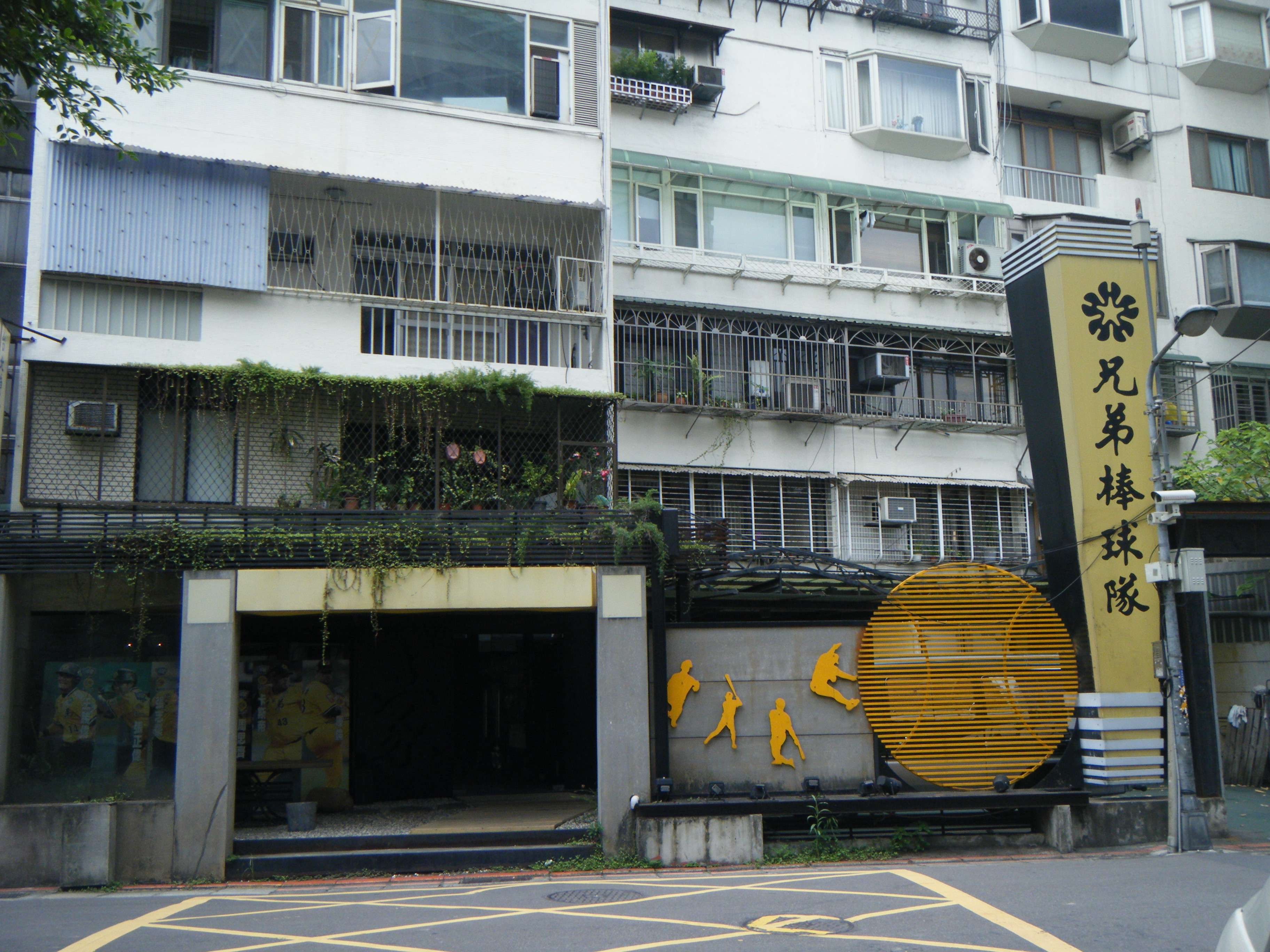 職棒兄弟象總部。